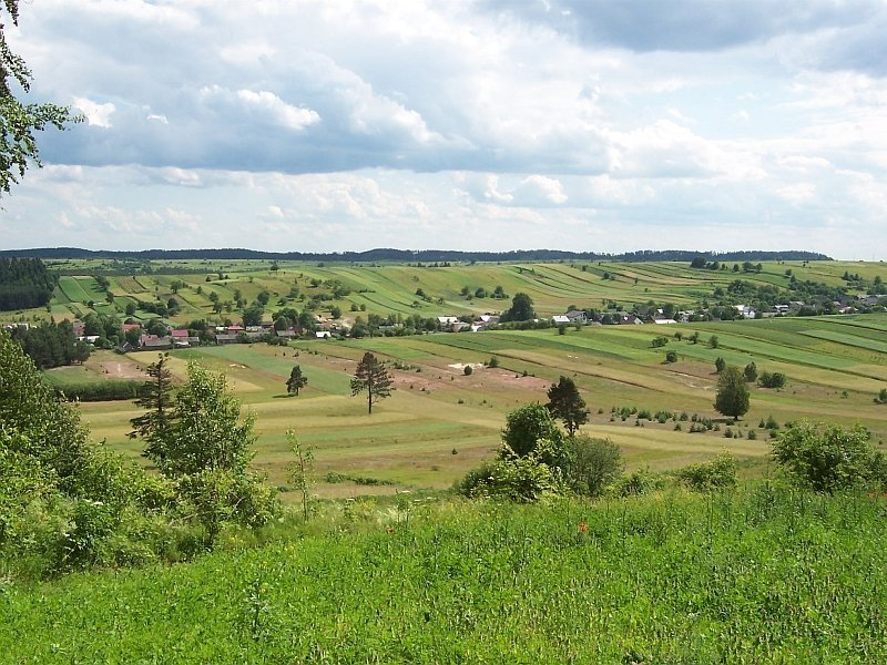 Widok z Bukowej Góry na pobliskie tereny Roztocza Środkowego oraz na położoną w malowniczym wąwozie wieś Sochy